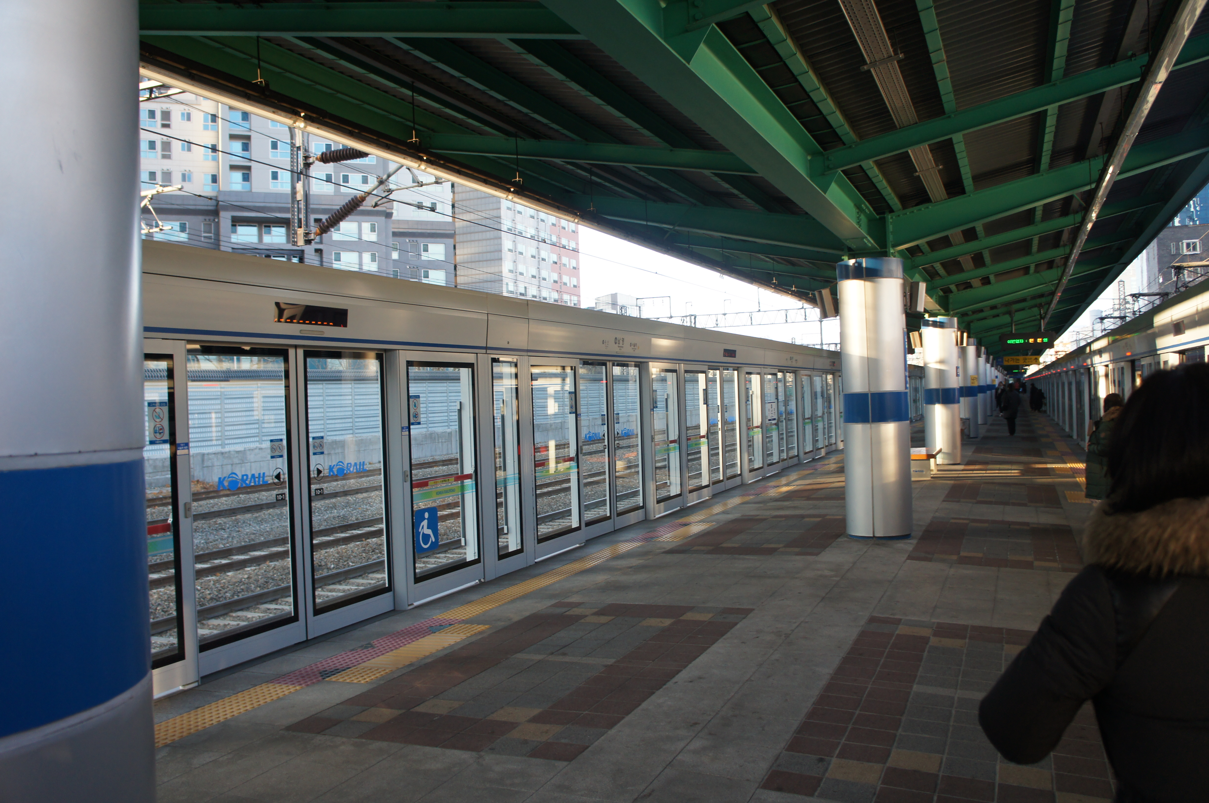 남영역 스크린도어 설치 이후 승강장